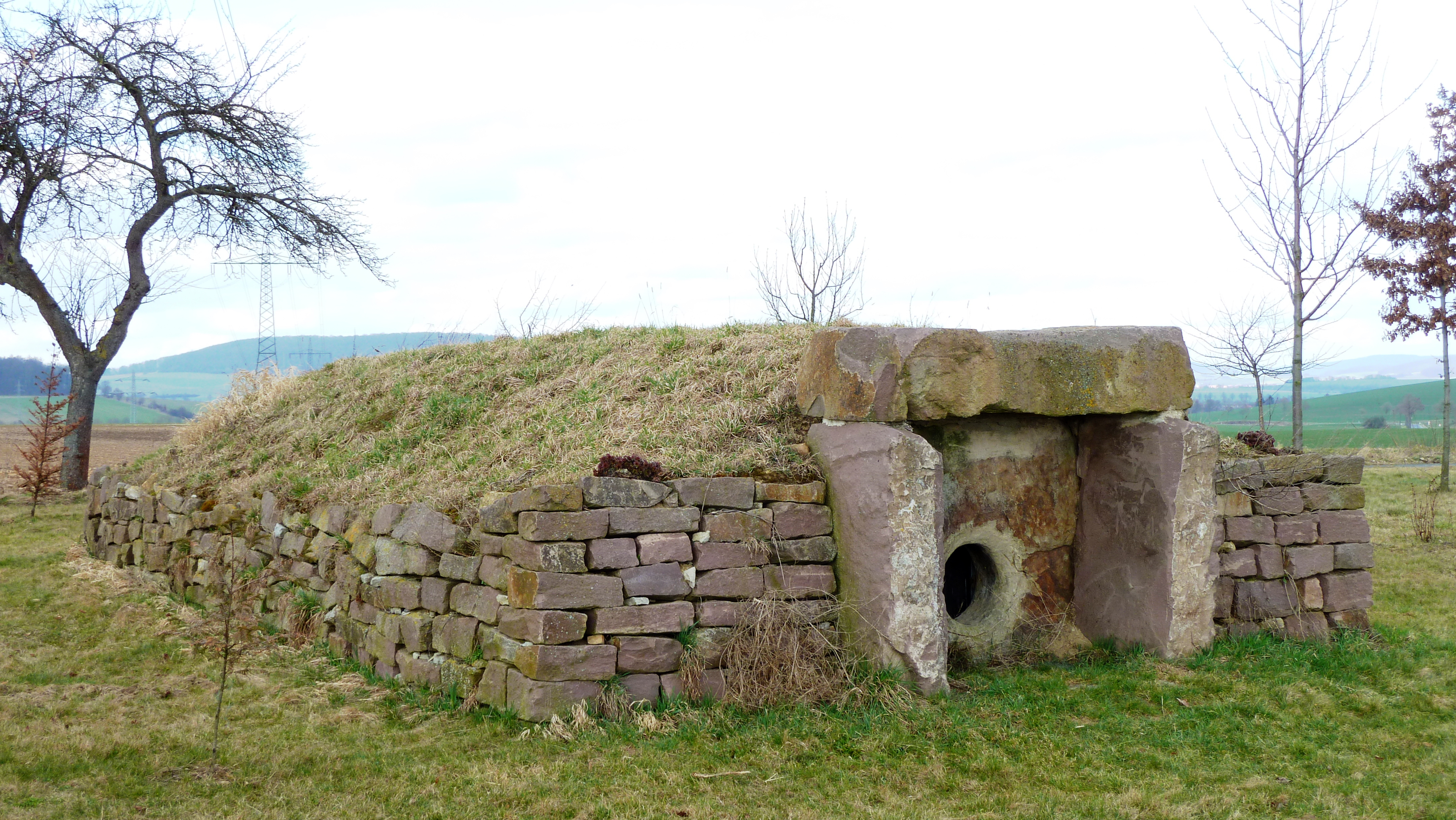 Rekonstruktion eines archaeologisch nachgewiesenen Gemeinschaftsgrabes (ca. 2700 v. Chr.) bei Großenrode, Stadt Moringen, Südniedersachsen